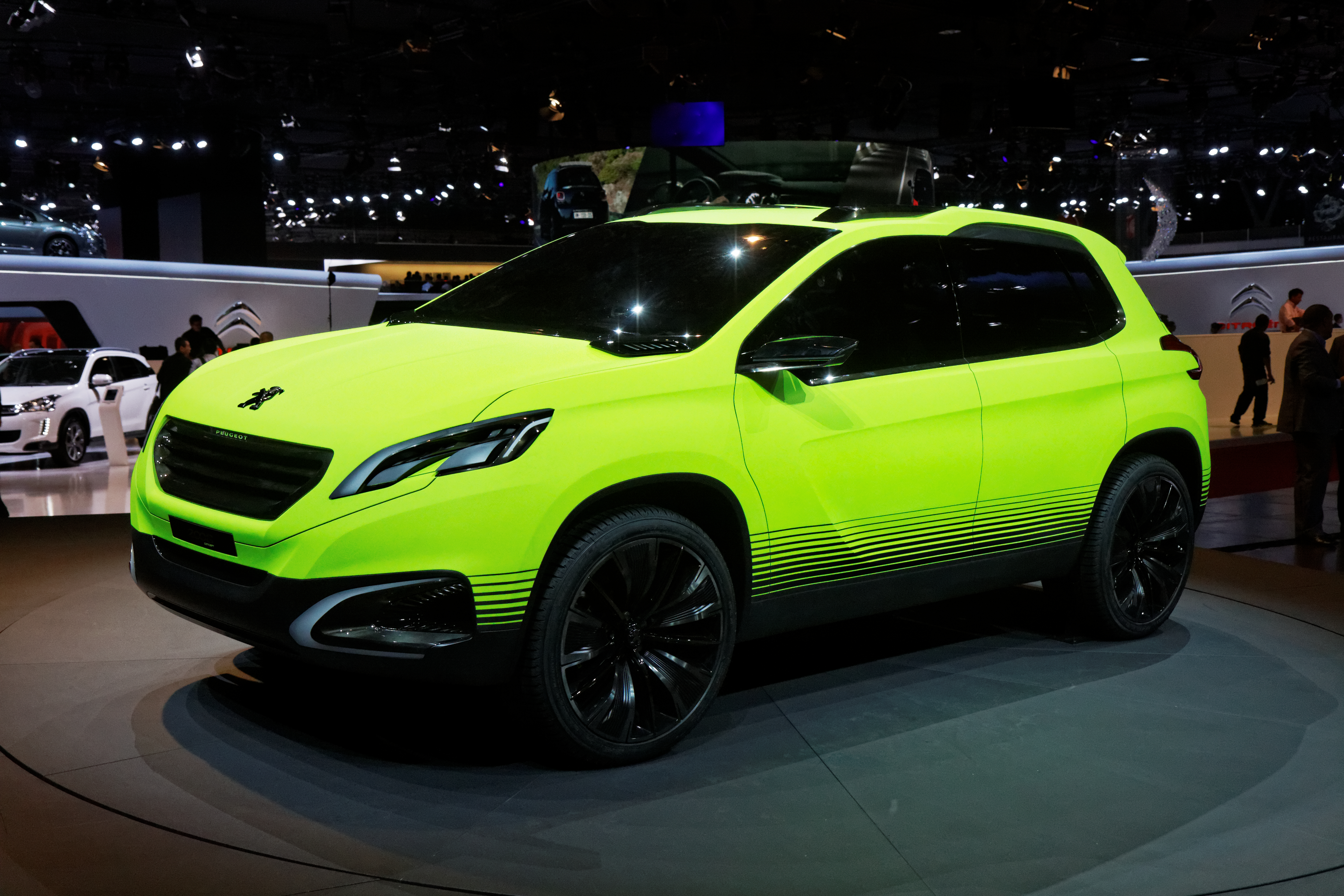 Une Peugeot 2008 Concept présentée lors du Mondial de l'Automobile de Paris 2012.